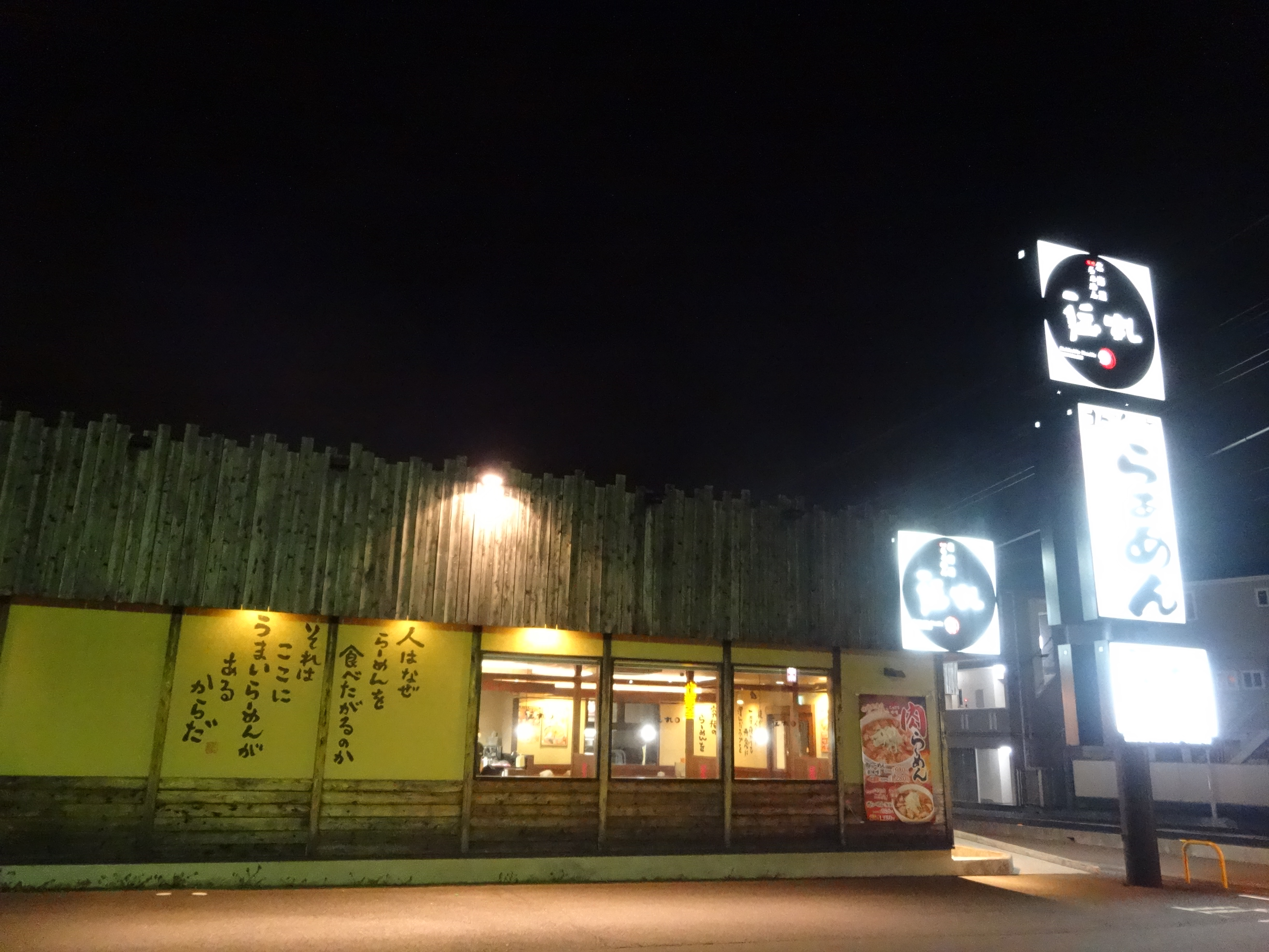 ゼンショーグループのラーメン店・伝丸 299号飯能BP店